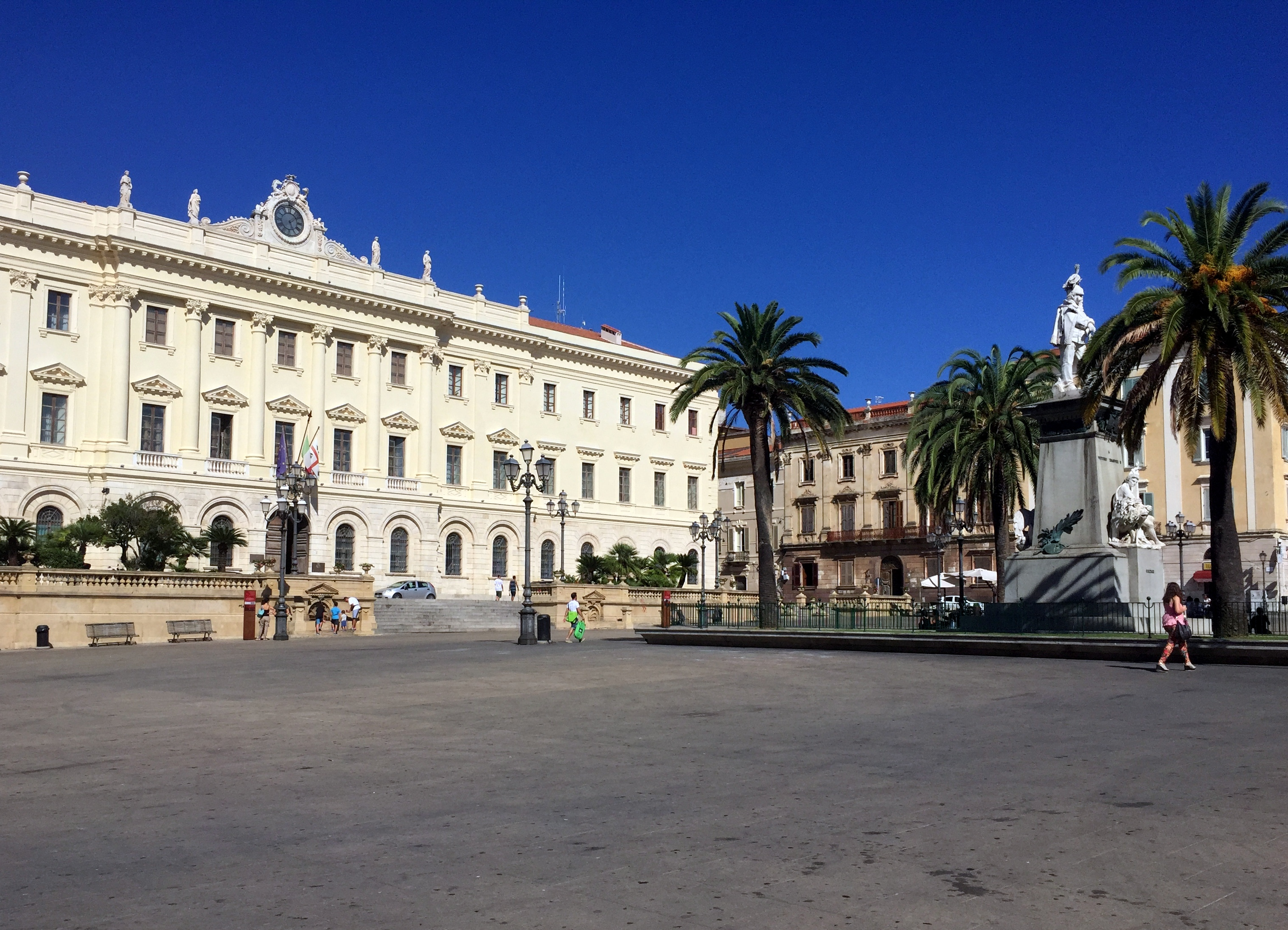 Image de Sassari, Sardaigne, juillet 2015.